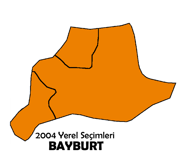 2004 Türkiye yerel seçimleri